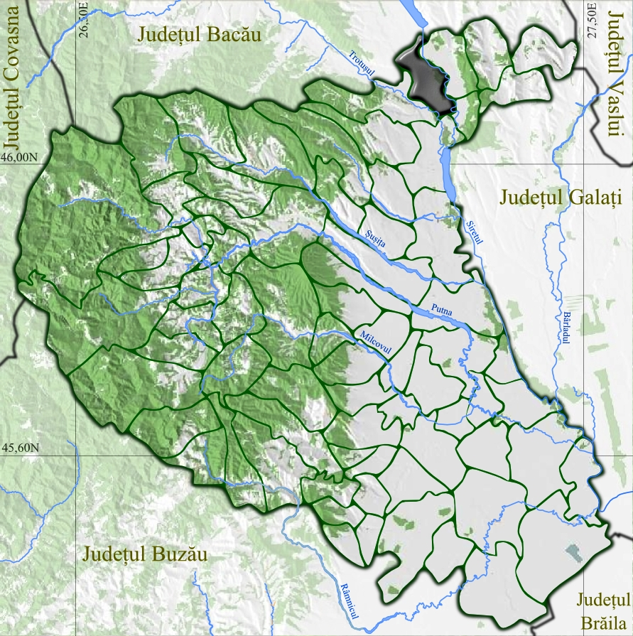 Adjud jud Vrancea.